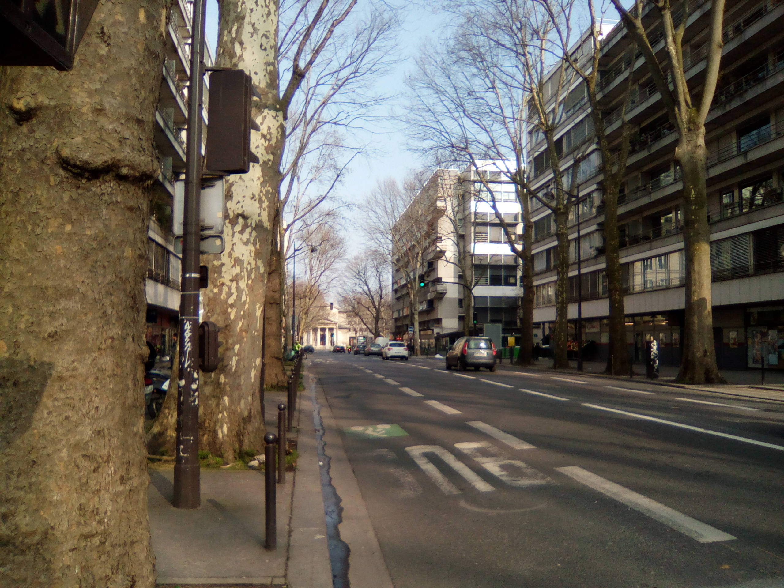 La rue Joseph Kessel à Paris 12e, vue depuis la rue Paul Belmondo. Au second plan : la rue de Dijon, qui se situe dans le prolongement de la rue Joseph Kessel. Au fond : la place Lachambeaudie. On aperçoit l'Église Notre-Dame-de-la-Nativité de Bercy.